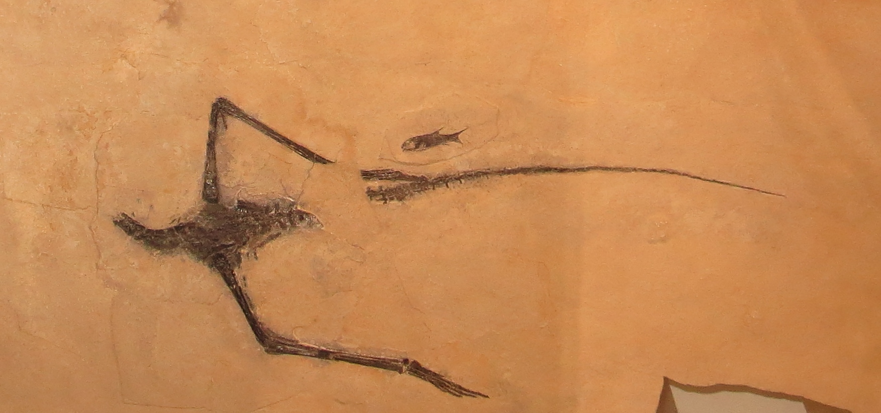 Fossil - Took the picture at Museum of Paleontology, Zurich